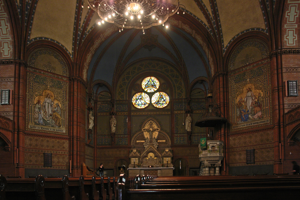 Görlitz, Lutherkirche (innen, Altarraum)